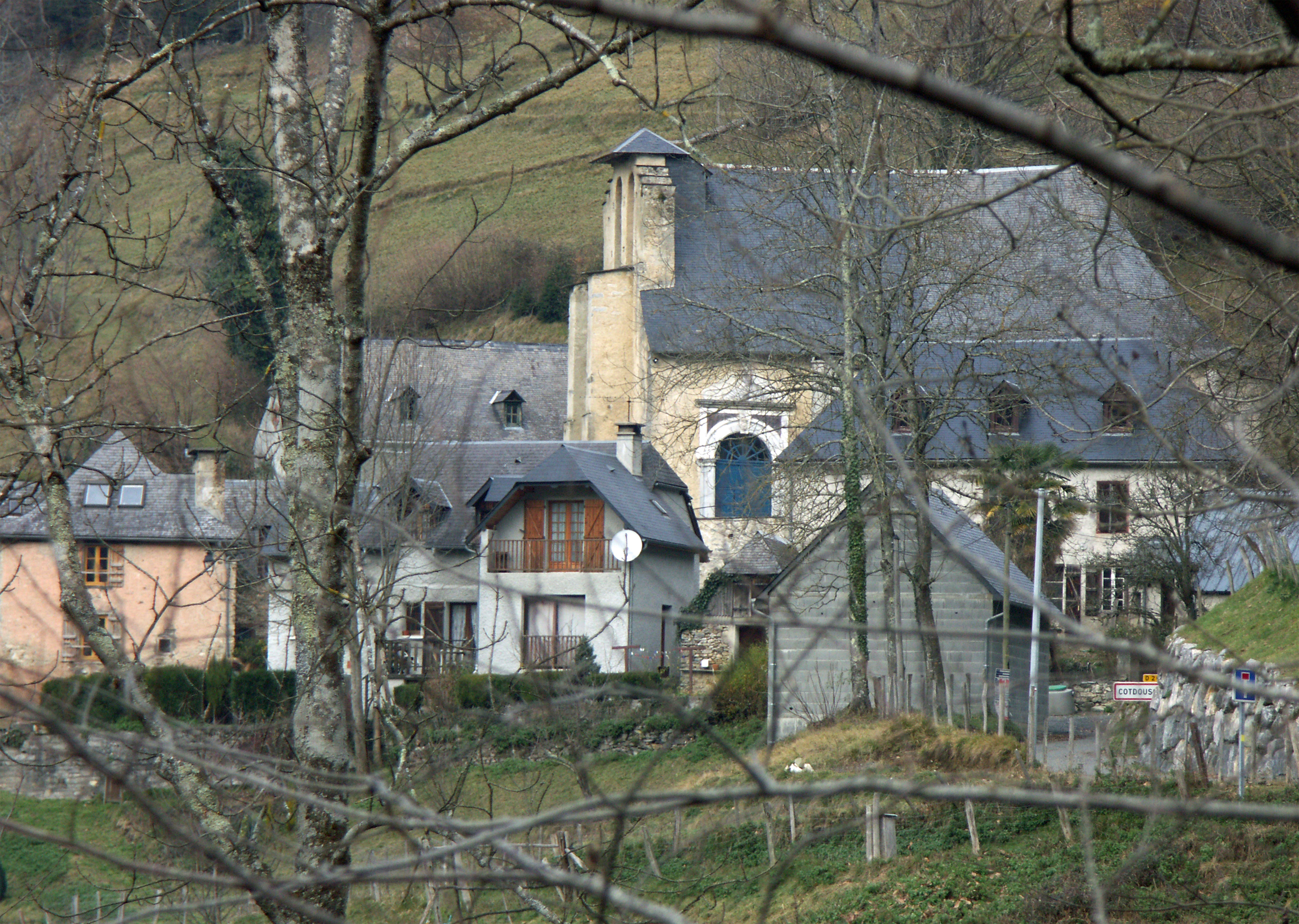 Le hameau de Cotdoussan (commune d'Ourdis-Cotdoussan), et son église St Jacques, classée par l'Unesco au Patrimoine Mondial au titre des chemins de Compostelle (1998)